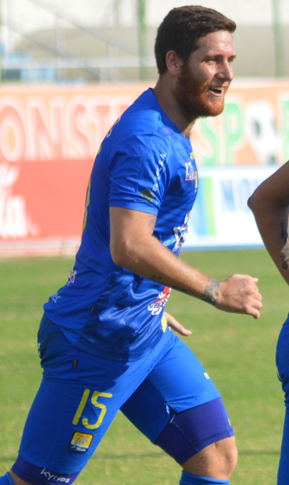 Francisco Silva en el Delfin de Ecuador 2015